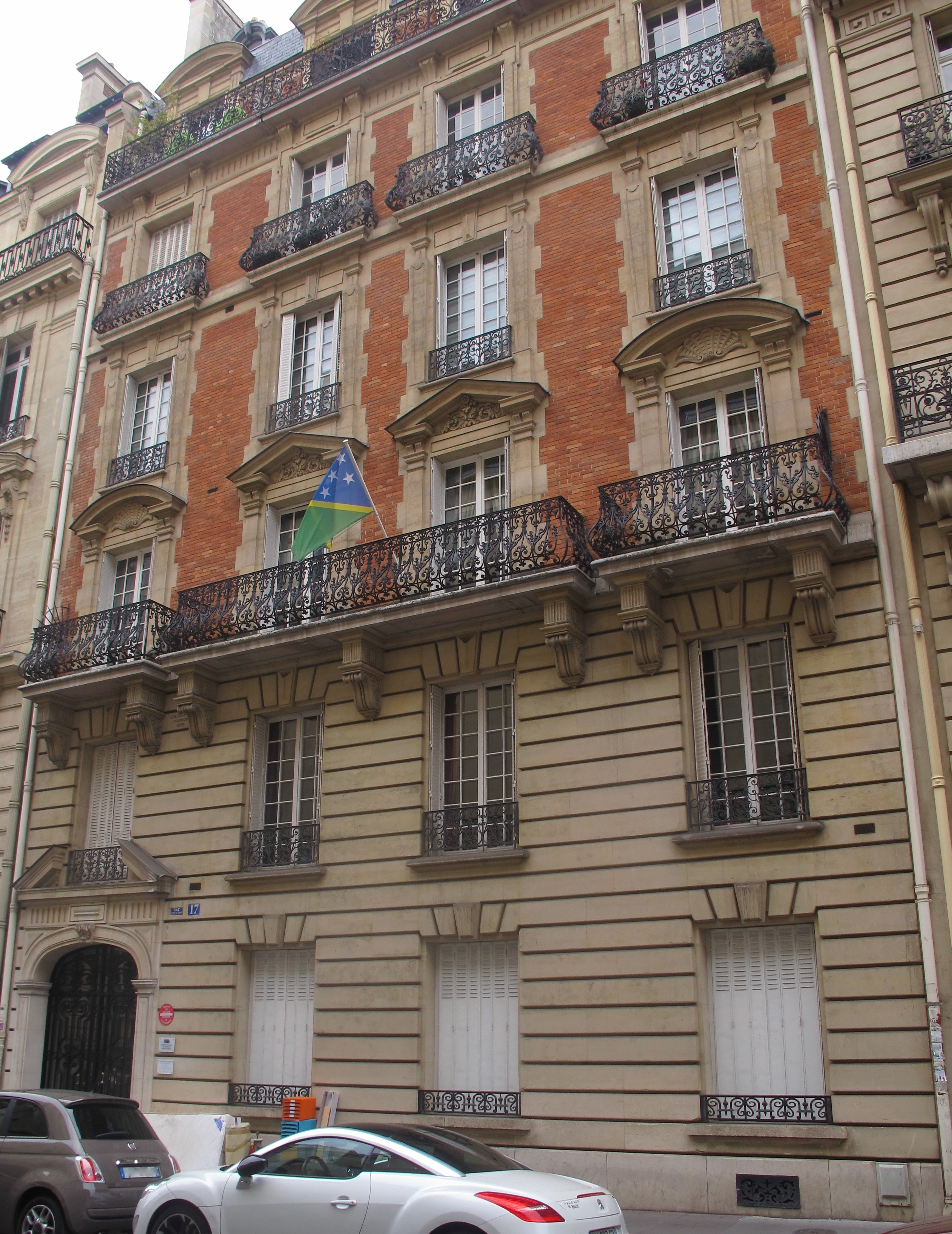 Délégation permanente des îles Salomon auprès de l'UNESCO, n°17 avenue d'Eylau (Paris, 16e).